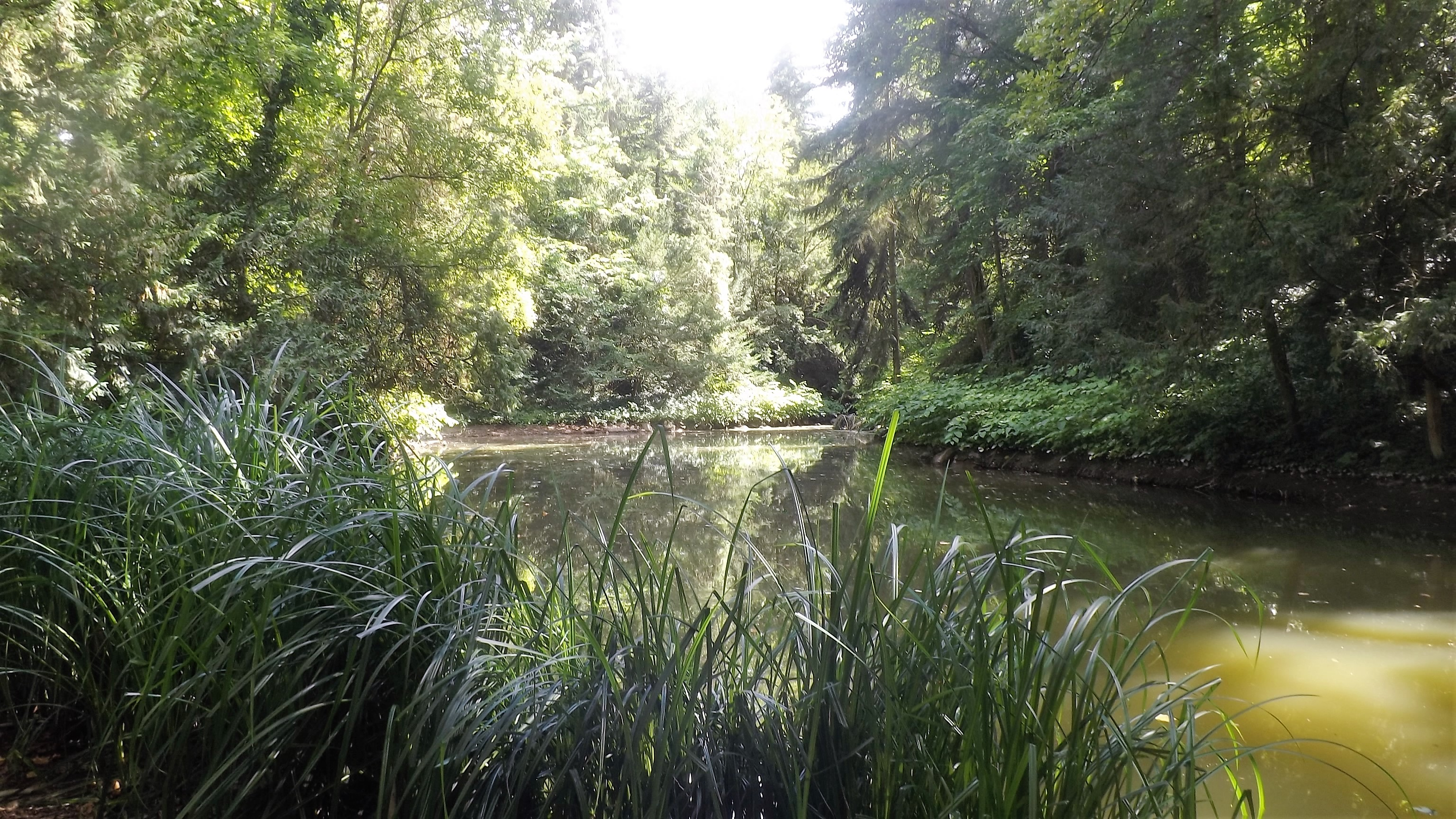 Vácrátóti botanikuskert